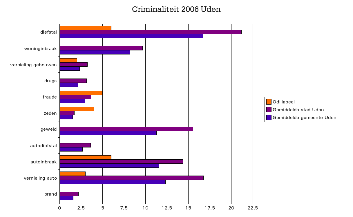 Criminaliteitcijfers in Uden Odiliapeel (2006), Noord-Brabant, The Netherlands